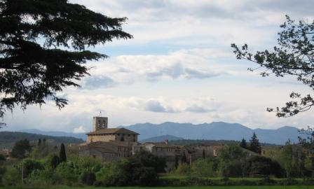 Avinyonet de Puigventós des del cementiri, foto feta l'abril del 2006